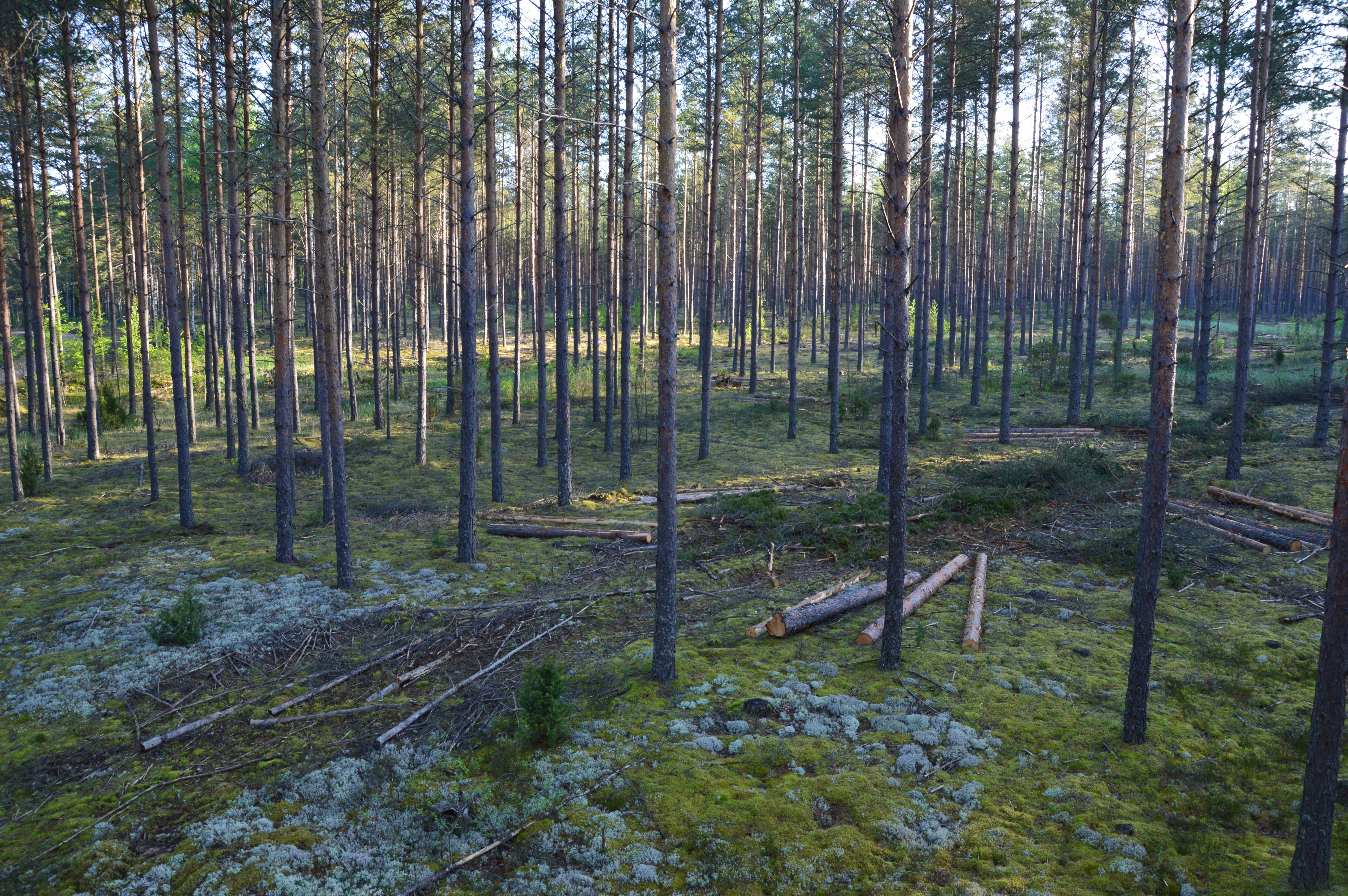 Mustoja maastikukaitseala.